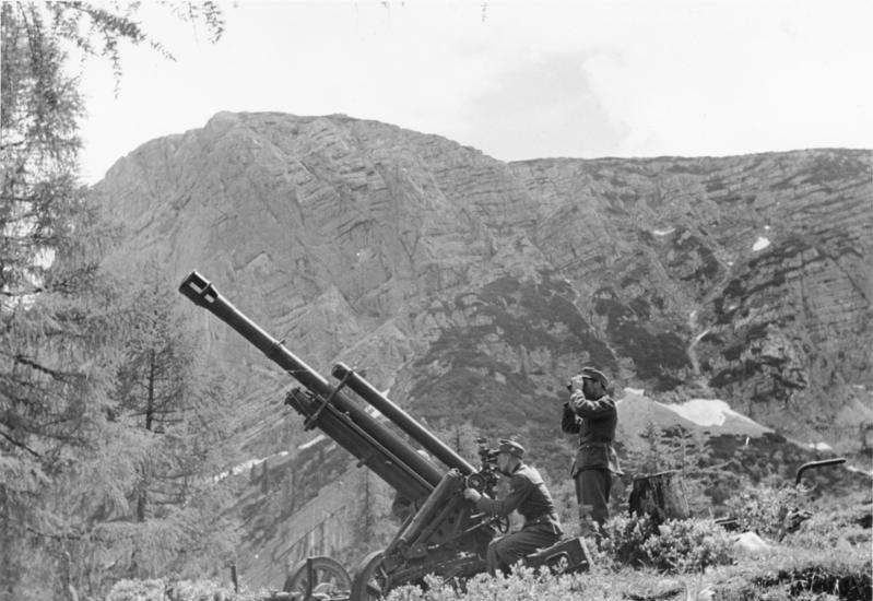 Gebirgshaubitze 40 mot. Geschütz in Feuerstellung Juni 1941 Ort: Dachstein-Geb. Oberdonau Bildberichter: Kolb